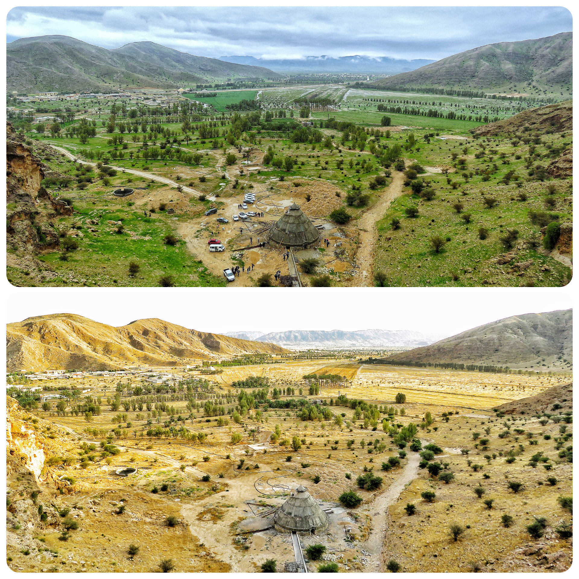 این دو عکس در ۲۹ اسفند ۹۷ و ۶ خرداد ۹۸ توسط اسحاق محمدی گرفته شده.